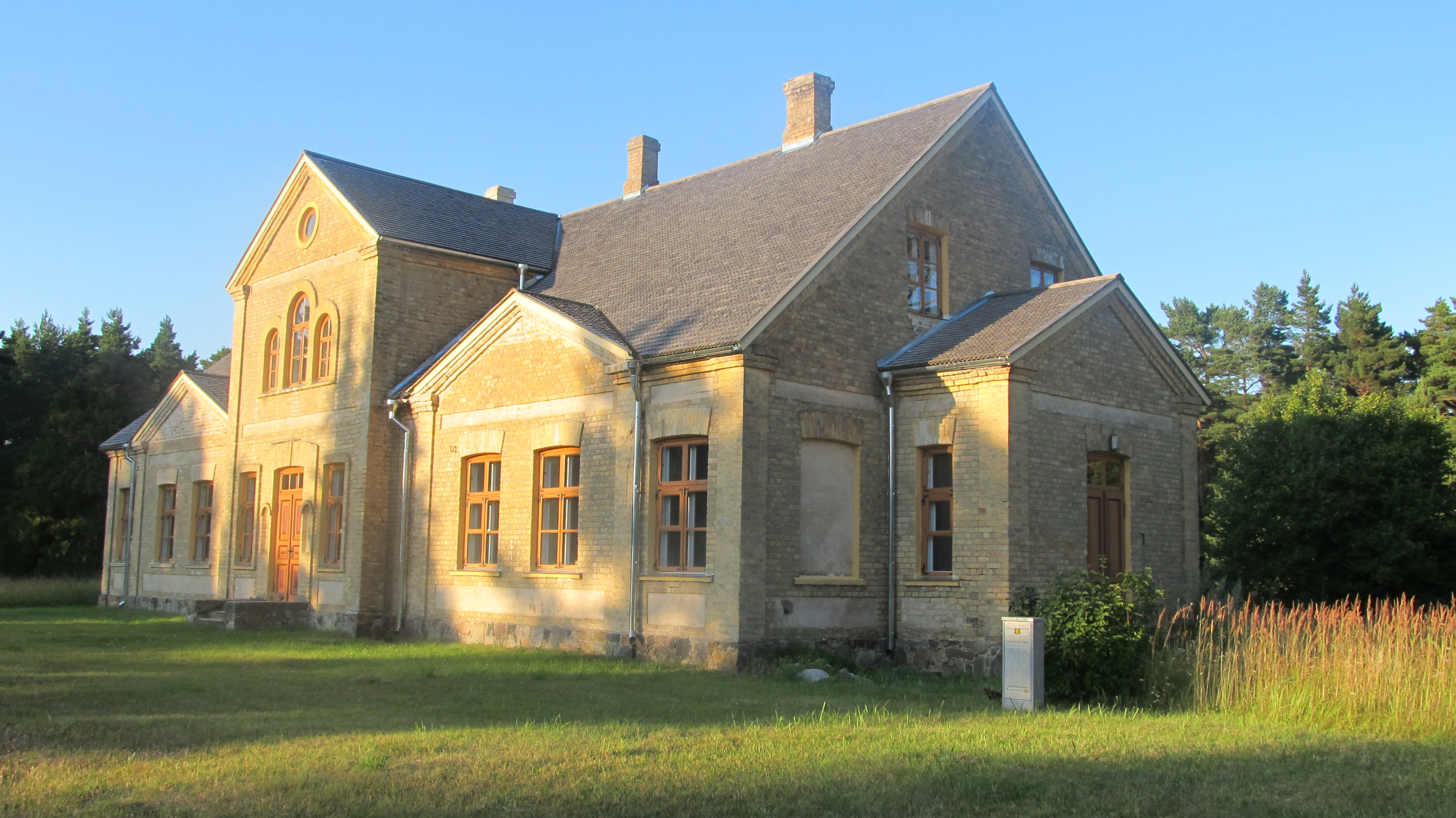 Kõpu õigeusu kirik-koolimaja